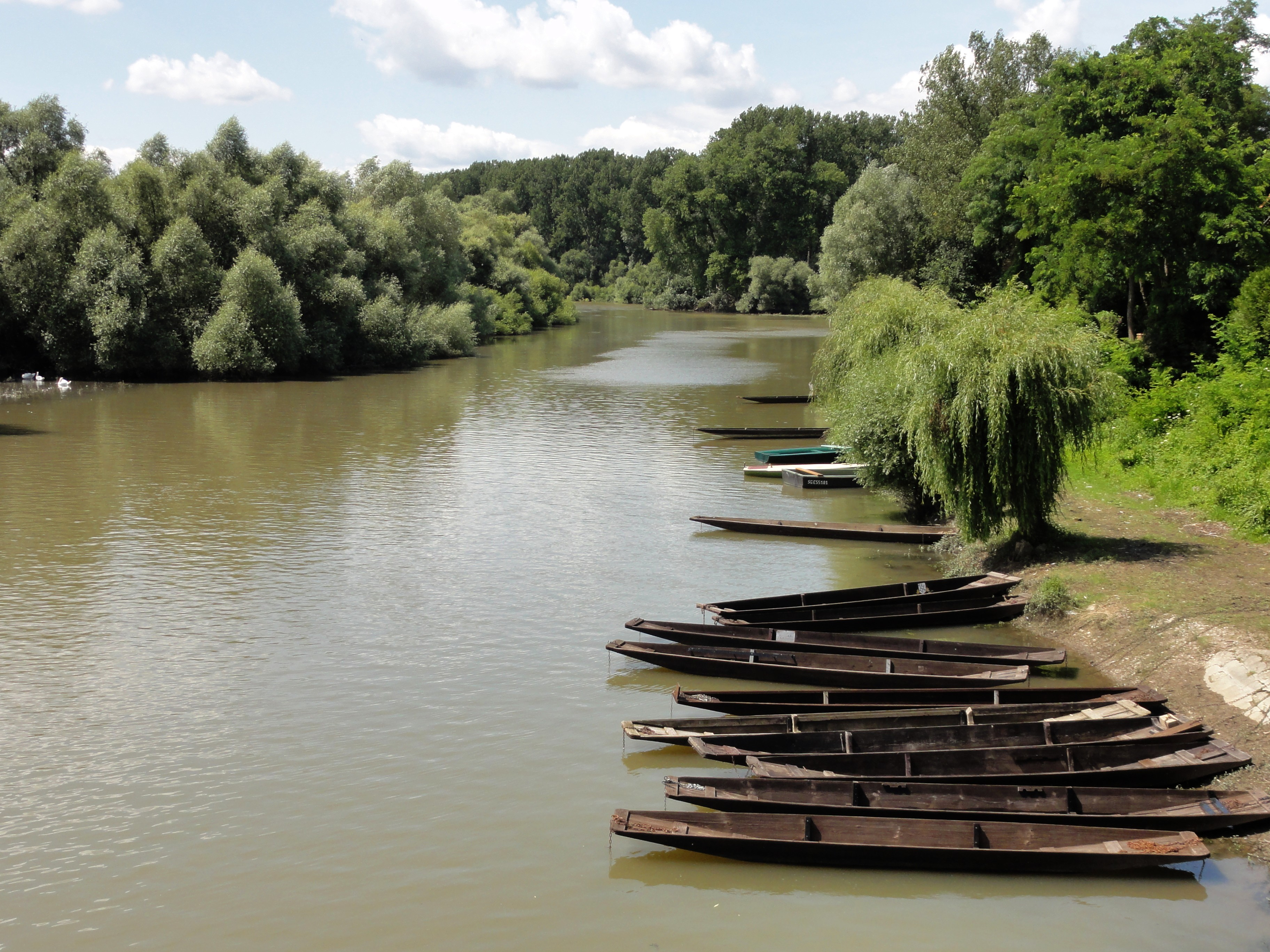 Alsace, Bas-Rhin, Munchausen, Le delta de la Sauer.